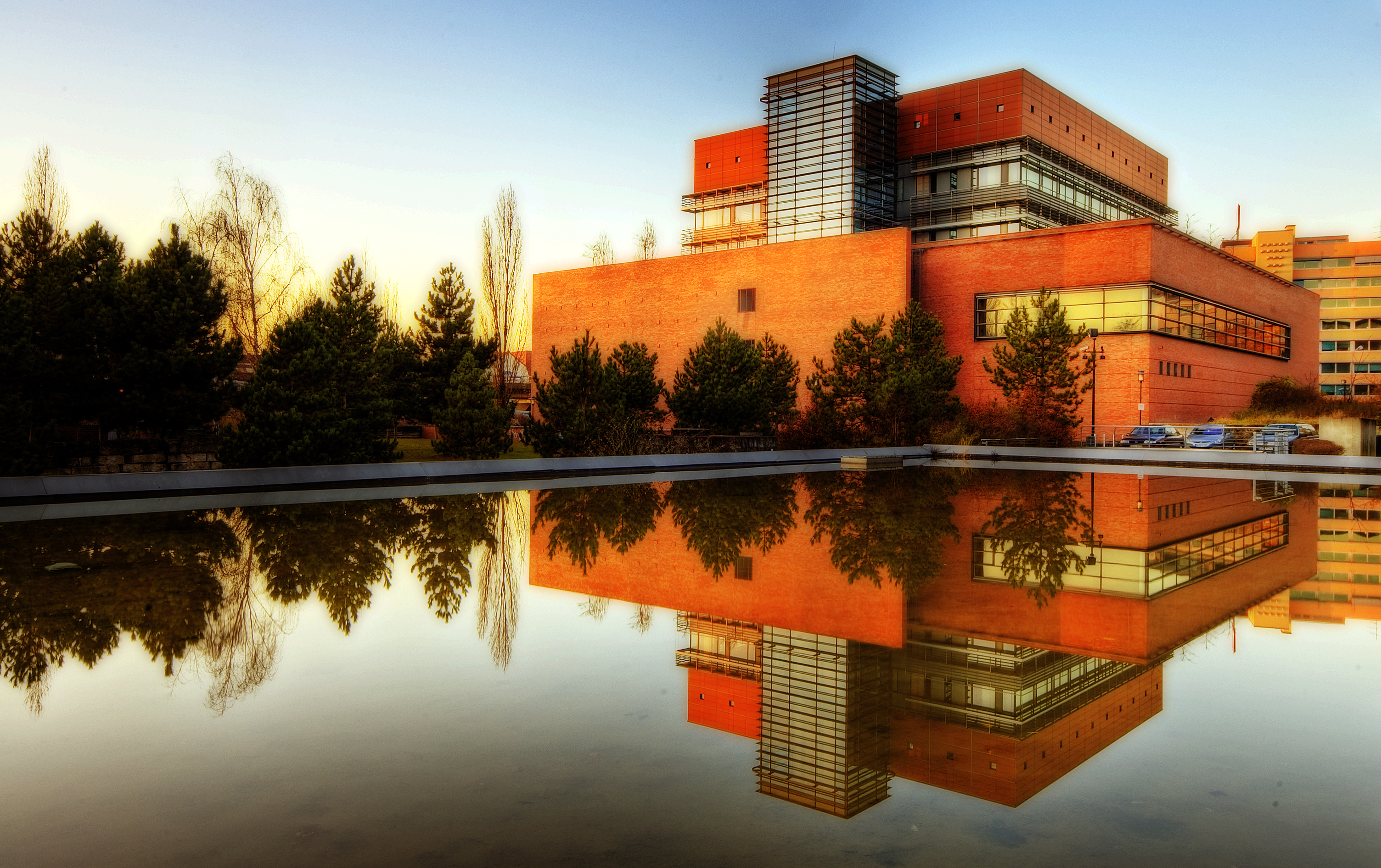 Klick here for a large view! Saarbrücken, Hafenstraße